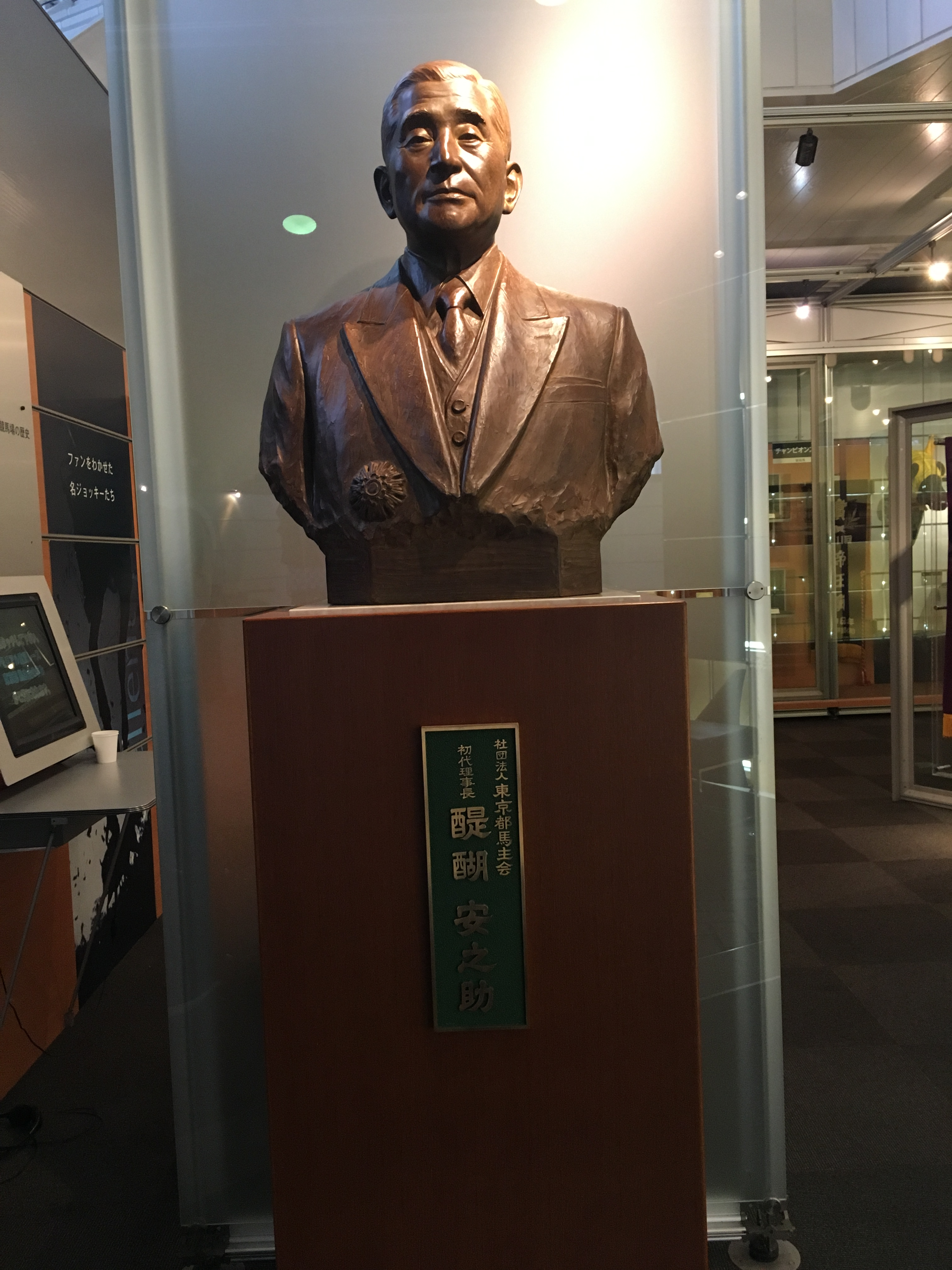 大井競馬場内